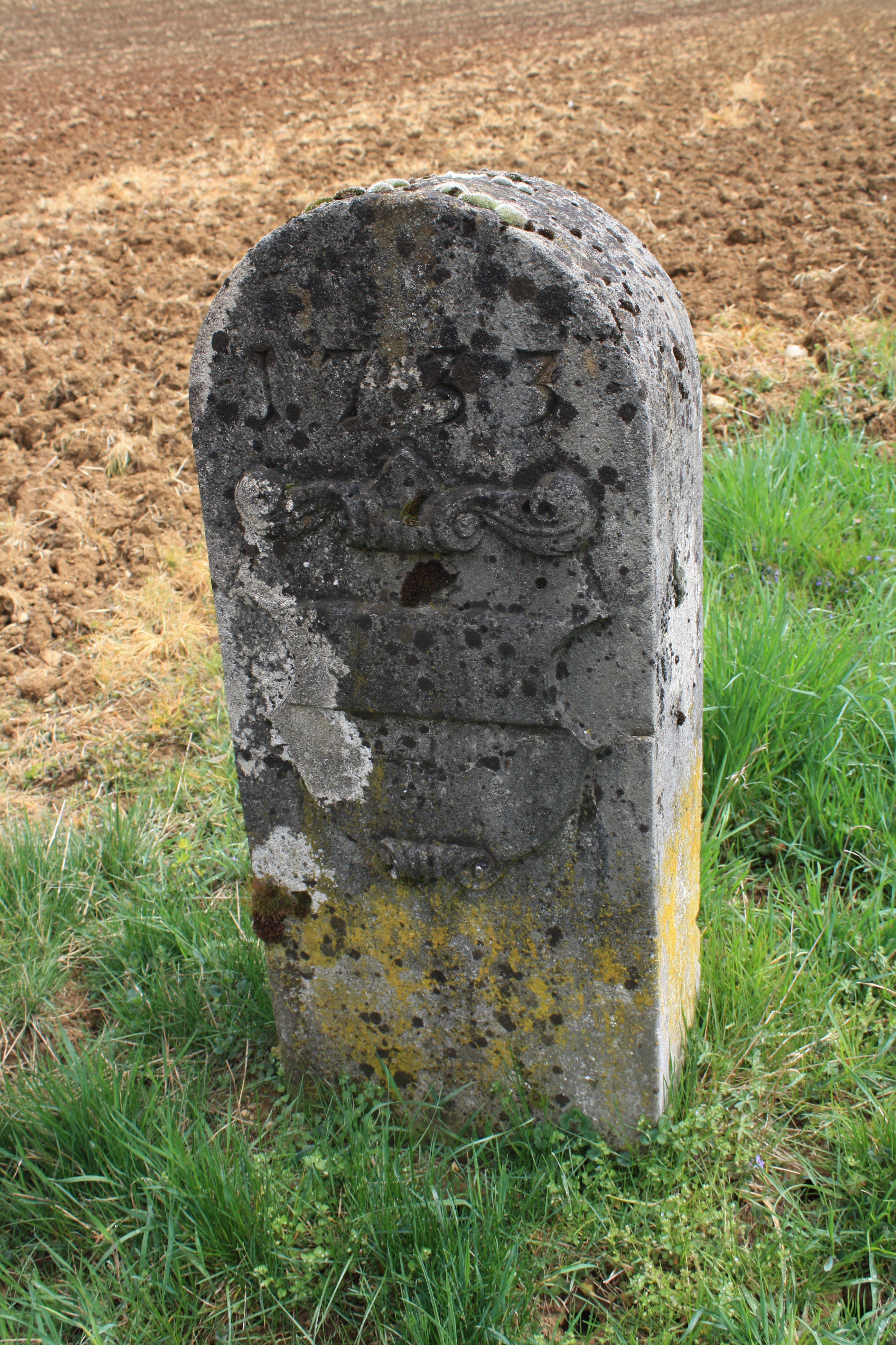 Bernisch-österreichicher Grenzstein von 1733 zwischen Bözen und Hornussen bei N 47.498874 O 8.075191